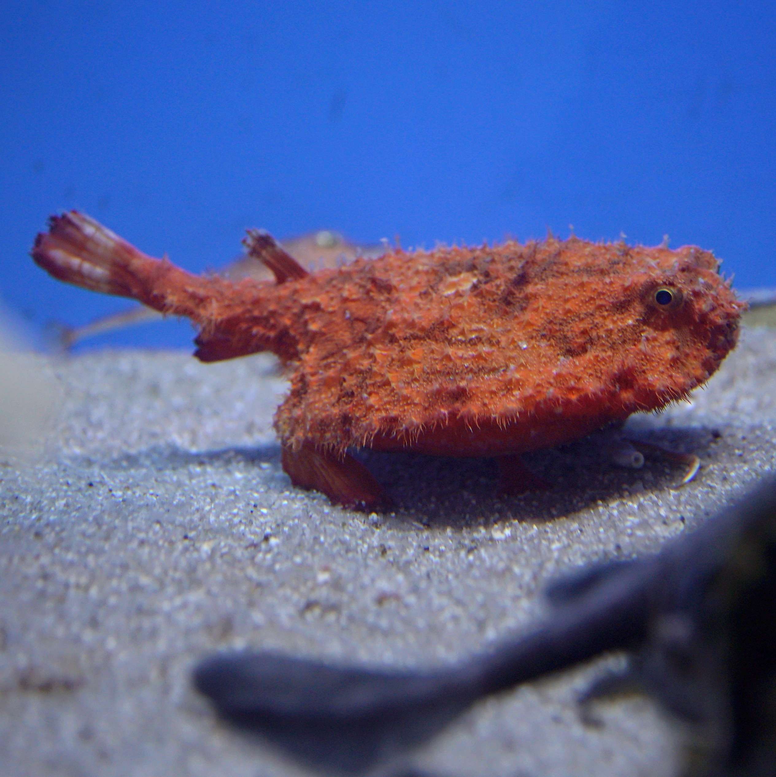 アカグツ Red Batfish, stellate seabat Domain: Eukaryota • Regnum: Animalia • Phylum: Chordata • Subphylum: Vertebrata • Infraphylum: Gnathostomata • Superclassis: Osteichthyes • Classis: Actinopterygii • Ordo: Lophiiformes • Familia: Ogcocephalidae • Genus: Halieutaea Wikispecies has an entry on: Halieutaea stellata. Species Halieutaea stellata (Vahl, 1797) 動物界 脊索動物門 条鰭綱 アンコウ目 アカグツ科 アカグツ属 Location: Takeshima Aquarium, Aichi pref. Japan Other photos: NCBI Taxonomy ID:215329 ITIS link: Halieutaea stellata (Vahl, 1797) (mirror) EOL link: Halieutaea stellata uBio search link: Halieutaea stellata